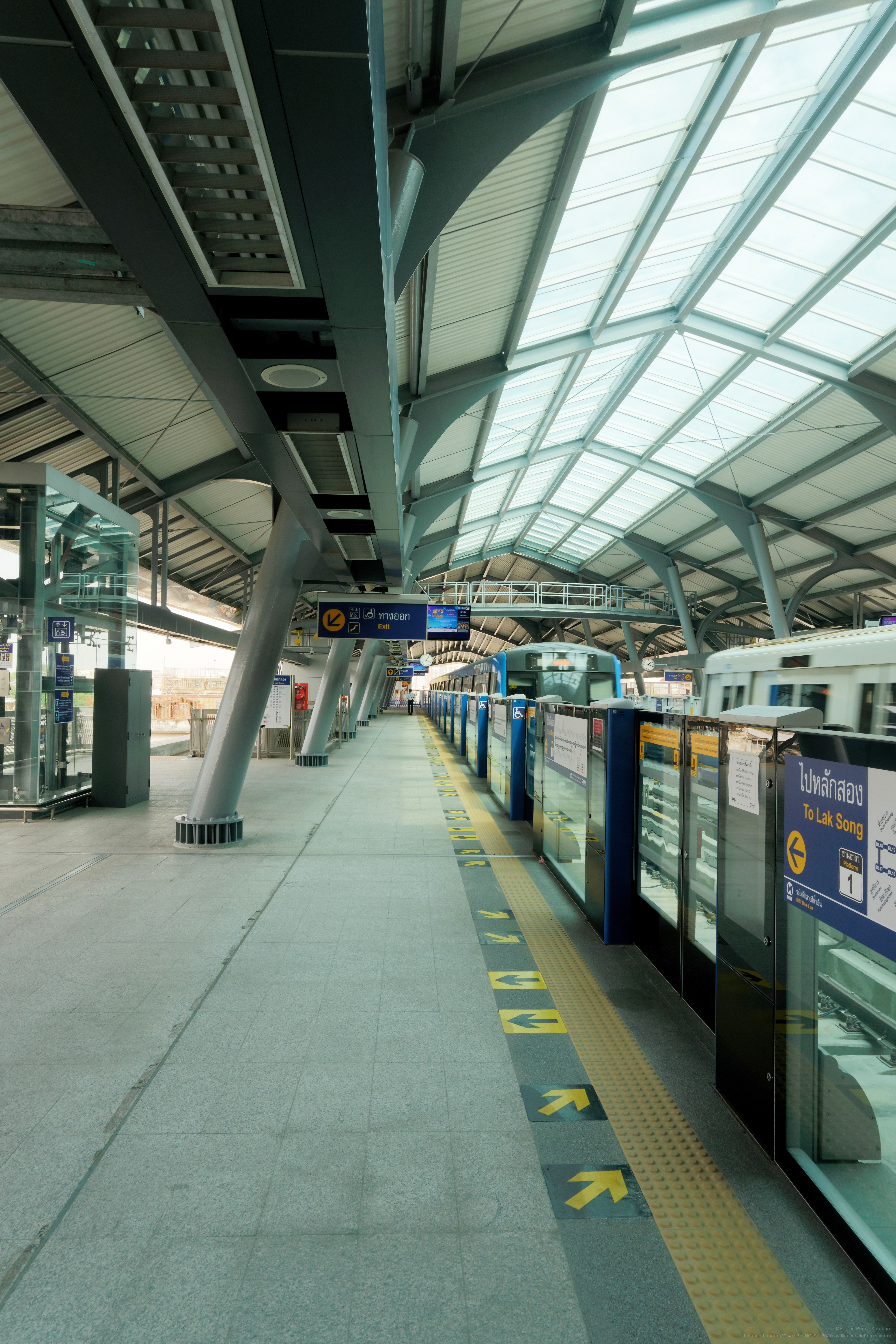 MRT Bang Khun Non – Platform